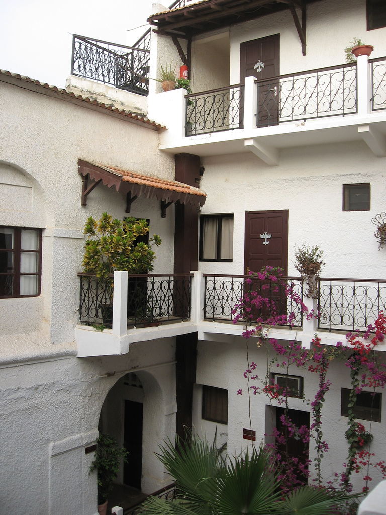 Hôtel de la Poste à Saint-Louis du Sénégal, proche du pont Faidherbe. Il hébergea les pilotes de l'Aéropostale, dont Mermoz, et nombre de célébrités.